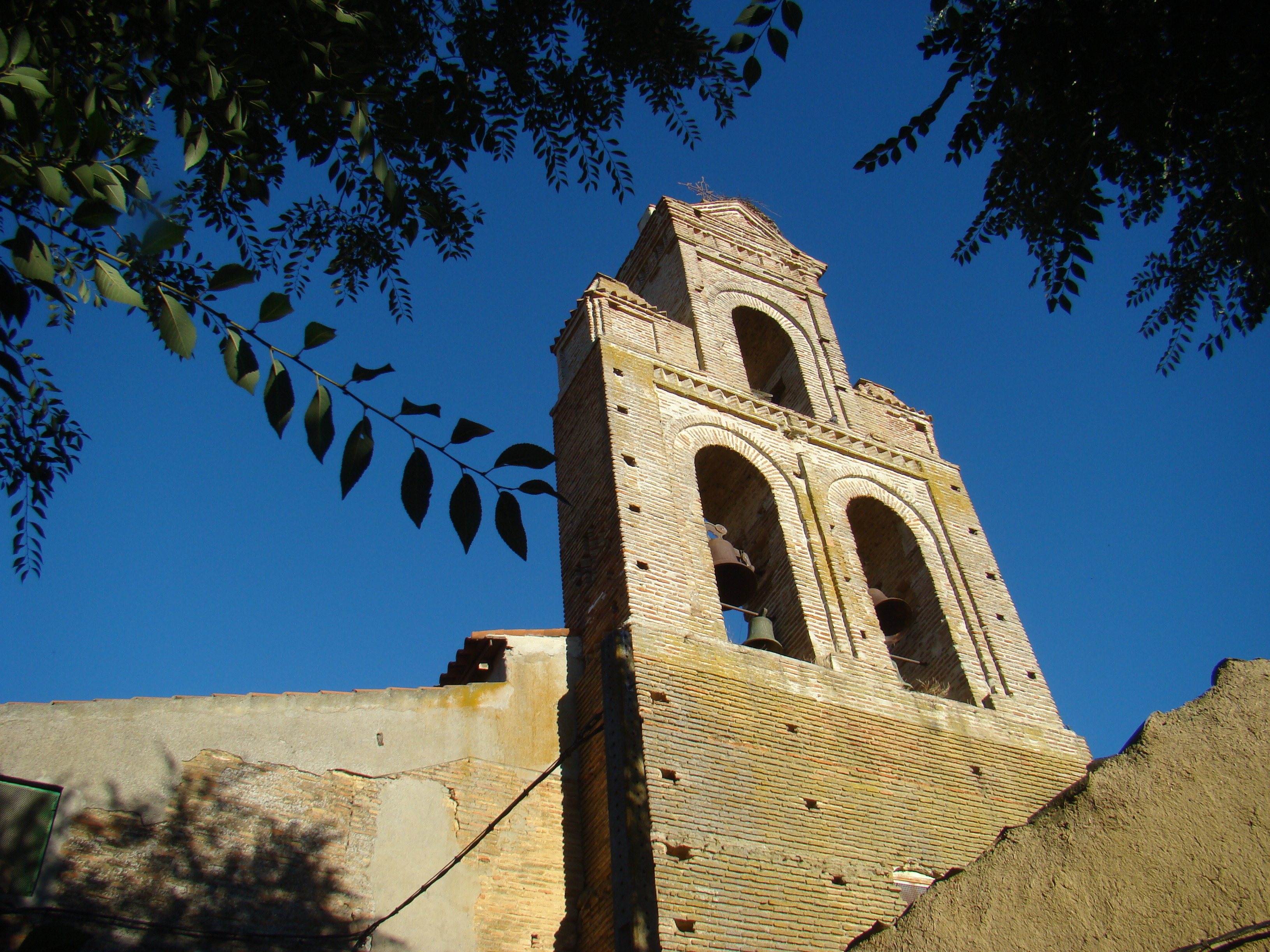 Villacid de Campos en la provincia de Valladolid, España. Iglesia parroquial de Santa María la Nueva, gótica del siglo XVI, construida en ladrillo a excepción de su cabecera que es de piedra de sillería.